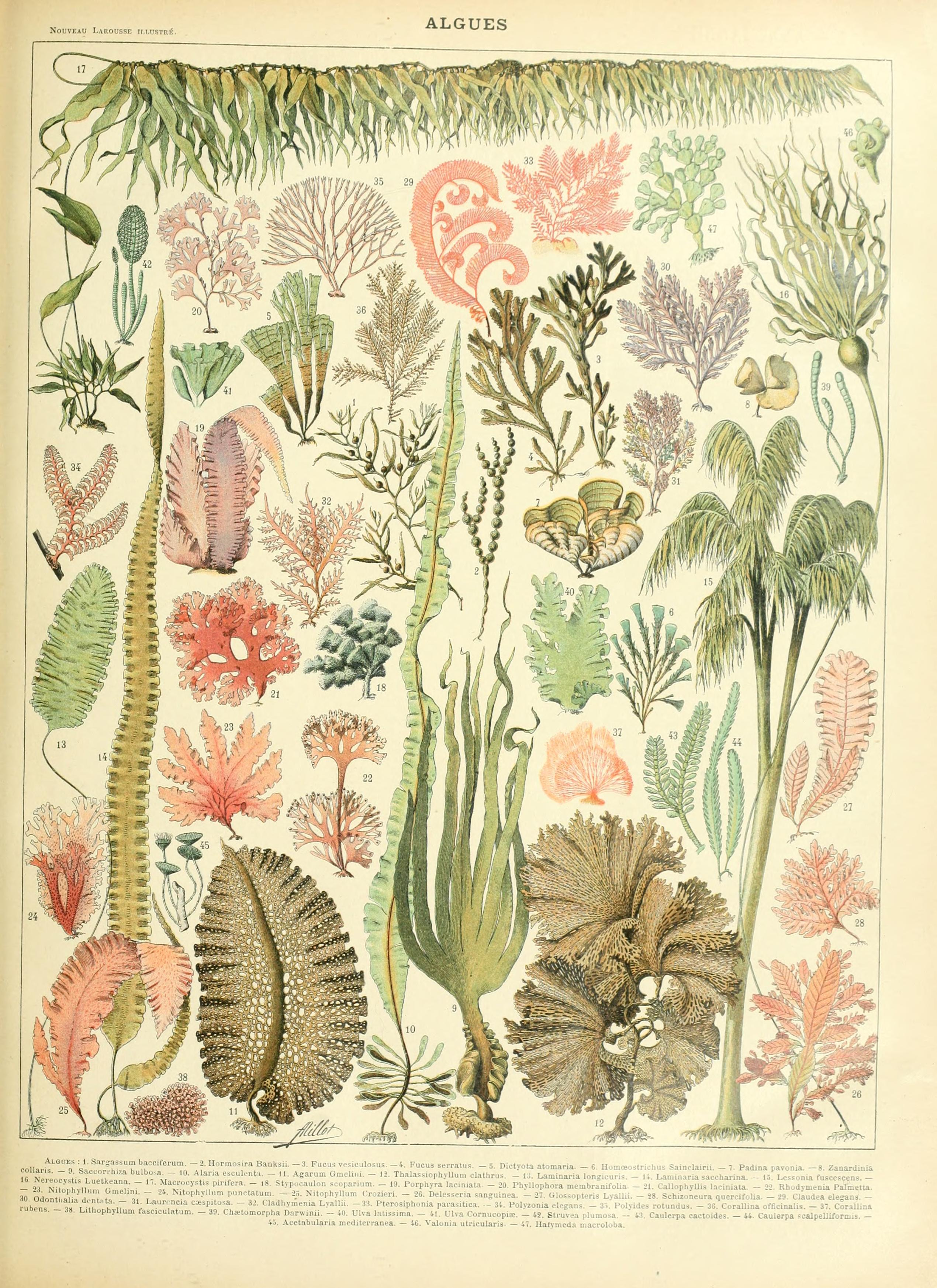 algues illustration larousses n1. Sargassum bacciferum (Sargassum natans); 2. Hormosira Banskii ; 3. Fucus vesicolosus ; 4. Fucus serratus ; 5. Dictyota atomaria (Dictyota hauckiana); 6. Homoestrichus Sainclairii ; 7. Padina pavonia (Padina pavonica); 8. Zanardinia collaris (Gymnosorus collaris); 9. Saccorhiza bulbosa (Saccorhiza polyschides); 10. Alaria esculenta ; 11. Agarum Gmelini (Agarum clathratum); 12. Thalassiophylum clathrus (Agarum clathrus); 13. Laminaria longissima (Saccharina longissima); 14. Laminaria saccharina (Saccharina latissima) ; 15. Lessonia fuscescens (Lessonia flavicans); 16. Nereocystis Luetkeana ; 17. Macrocystis prifera (Macrocystis pyrifera); 18. Stypocaulon scoparium (Halopteris scoparia); 19. Porphyra laciniata ; 20. Phyllophora membranifolia (Phyllophora pseudoceranoides); 21. Callophyllis laciniata ; 22. Rhodymenia Palmetta (Palmaria palmata); 23. Nitophyllum Gmelini (Erythroglossum laciniatum); 24. Nitophyllum punctatum ; 25. Nitophyllum Crozieri (Cryptopleura crozieri); 26. Cryptopleura crozieri ; 27. Glossopteris Lyallii (Cladodonta lyallii); 28. Schizoneura quercifolia (Phycodrys quercifolia); 29. Claudea elegans ; 30. Odonthalia dentata ; 31. Laurencia caespitosa (Osmundea hybrida); 32. Cladhymenia Lyallii ; 33. Pterosiphonia parasitica ; 34. Polyzonia elegans ; 35. Polyides rotundus ; 36. Corallina officinalis ; 37. Corallina rubens (Jania rubens); 38. Lithophyllum fasciculatum ; 39. Chaetomorpha Darwinii (Chaetomorpha coliformis); 40. Ulva latissima (Saccharina latissima); 41. Ulva Cornucopiae ; 42. Struvea plumosa ; 43. Caulerpa cactoides ; 44. Caulerpa scalpelliformis ; 45. Acetabularia mediterranea (Acetabularia acetabulum); 46. Valonia utricularis ; 47. Halymeda macroloba.